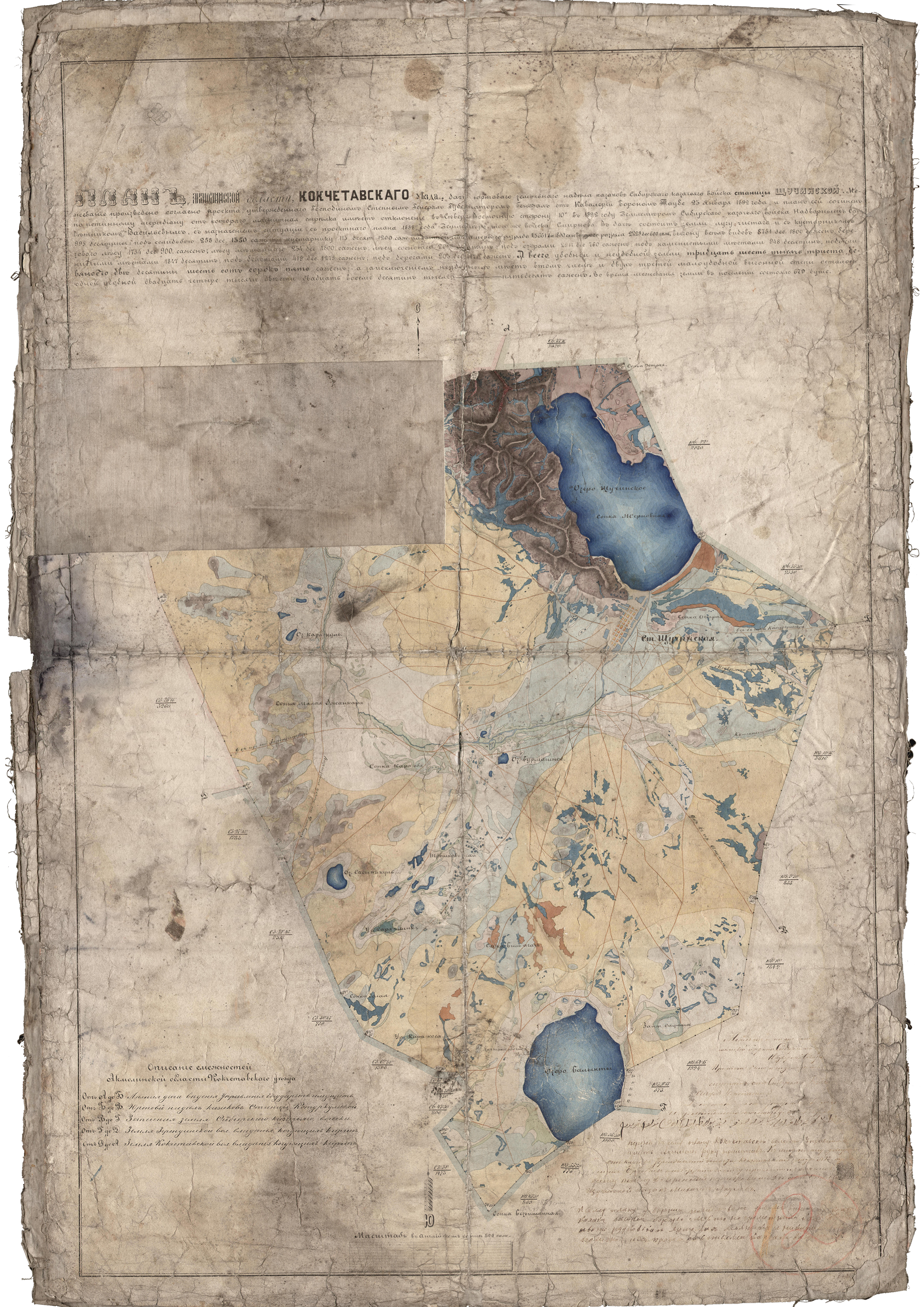 Планъ Акмолинской области, Кокчетавскаго уъзда, станицы Щучинской